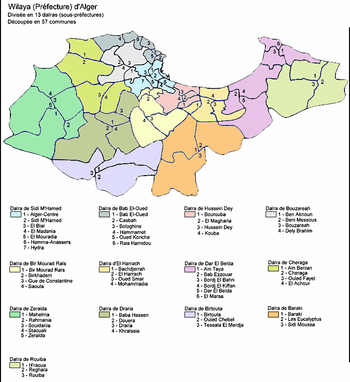 Daïras (Sous Préfectures) et Communes de la Wilaya (Préfecture) d'Alger.